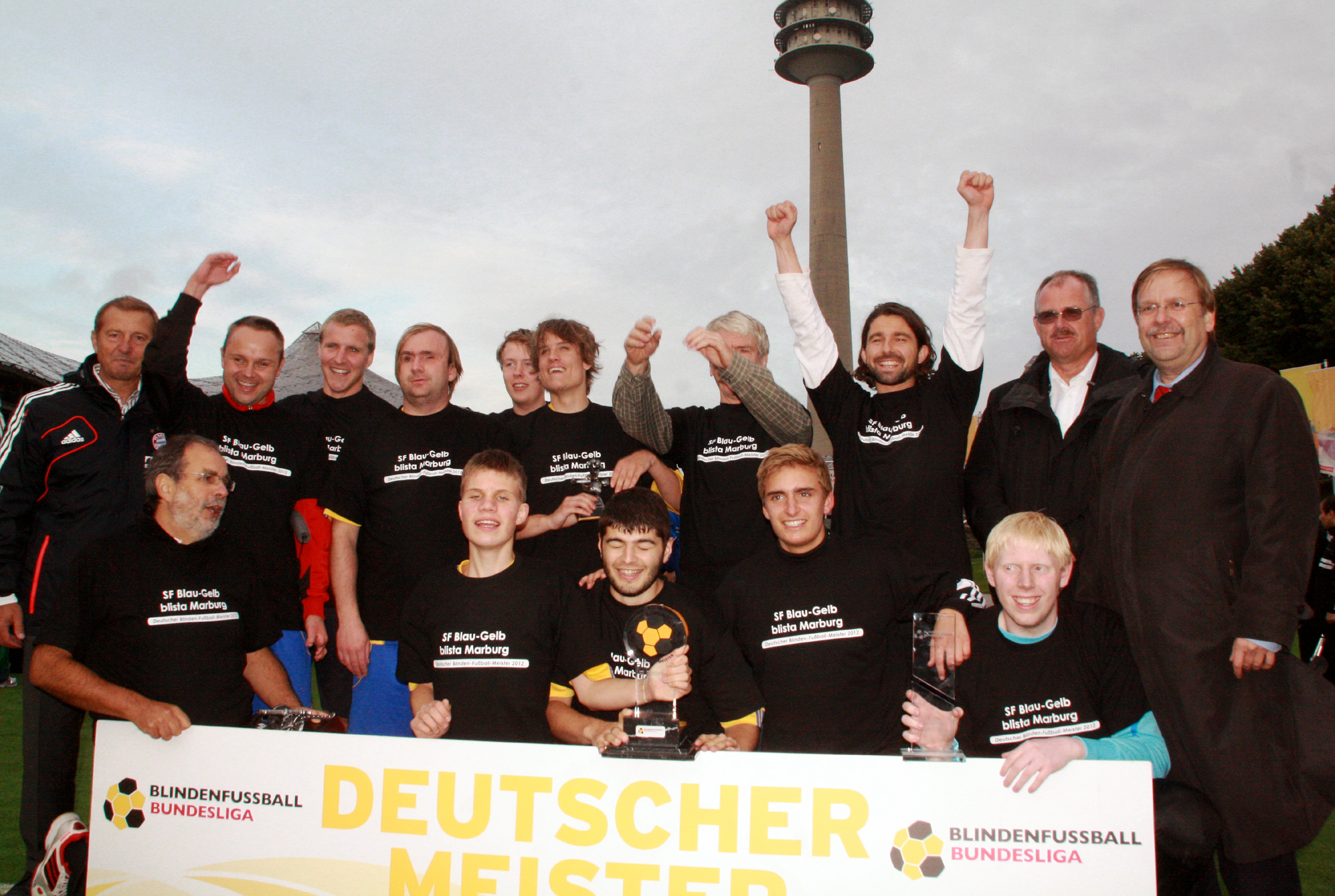 Der Blindenfussball-Meister 2012: Die Sportfreunde Blau-Gelb Marburg am 22.09.2012 auf dem Coubertinplatz im Münchener Olympiagelände. Ganz Links: Wolfgang Dremmler, Botschafter der Sepp-Herberger-Stiftung und Leiter des Jugendleistungszentrums des FC Bayern, ganz rechts: Dr. Rainer Koch, Vizepräsident des DFB